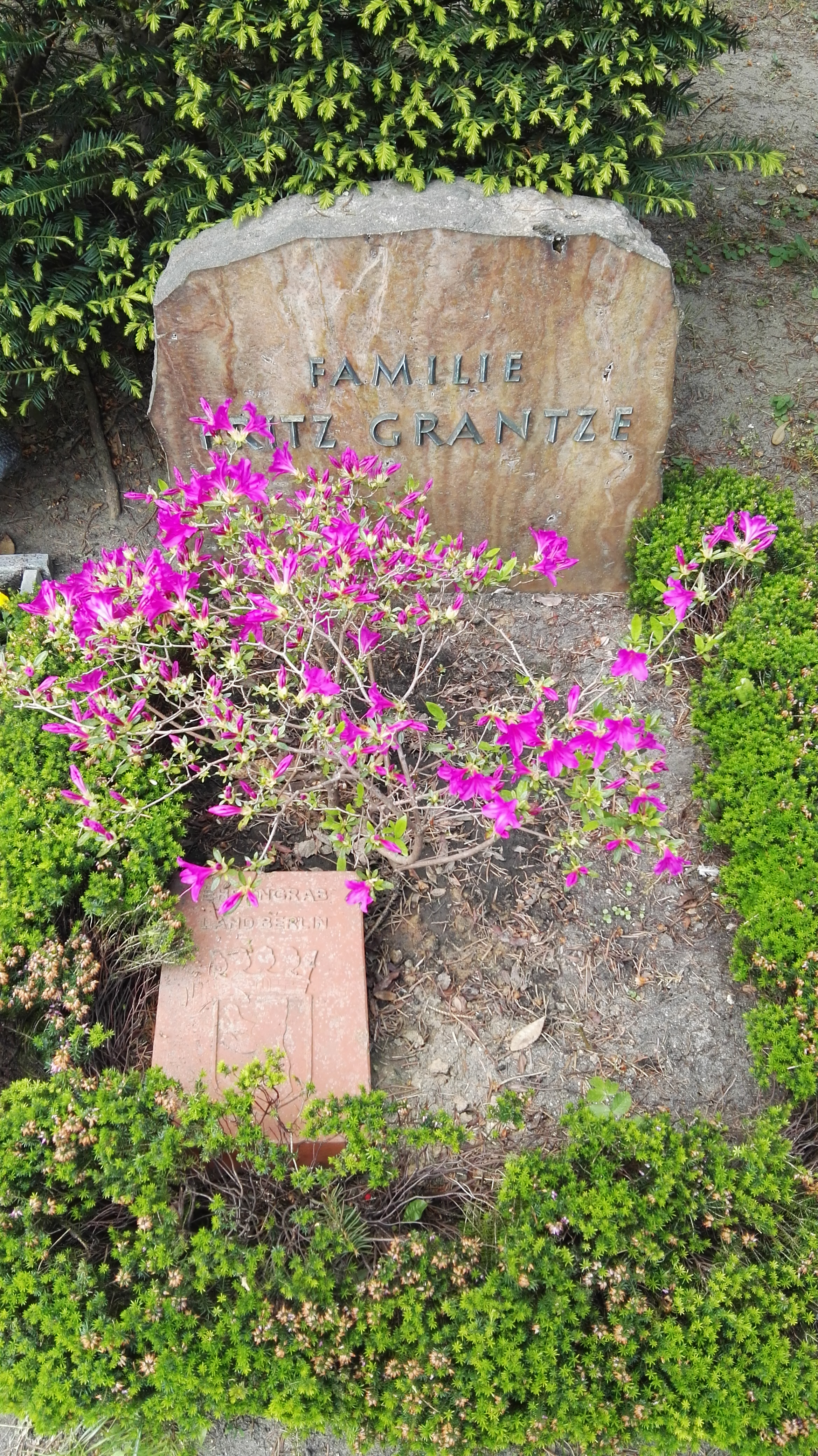 Grab von Fritz Grantze auf dem Heidefriedhof in Berlin; Ehrengrab